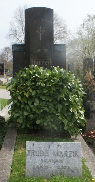 Grab Trude Marzik-Friedhof Hernals